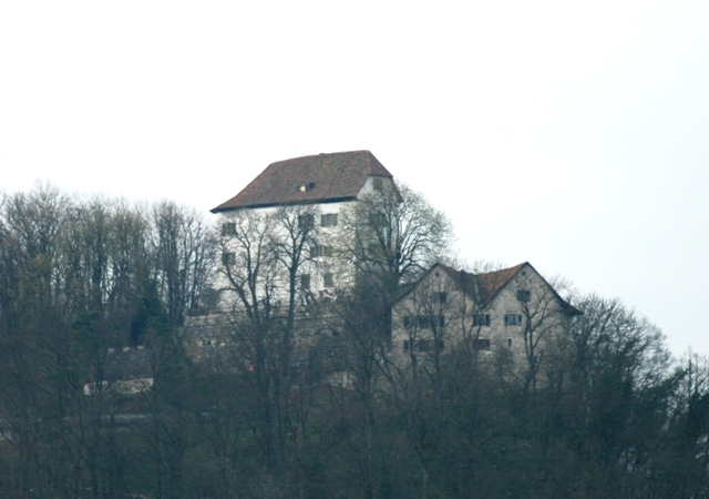 Schloss Brunegg, Aaragu, Schweiz